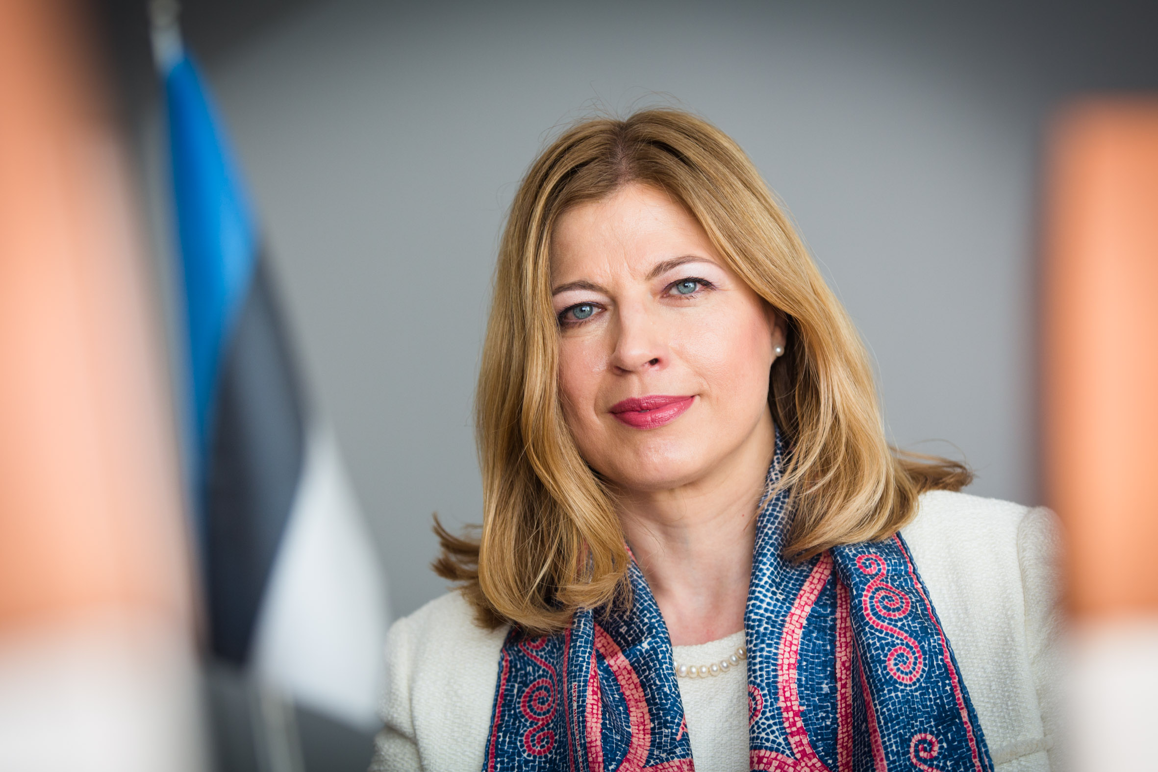 Suursaadik Katrin Kivi, Eesti alaline esindaja Euroopa Nõukogu juures